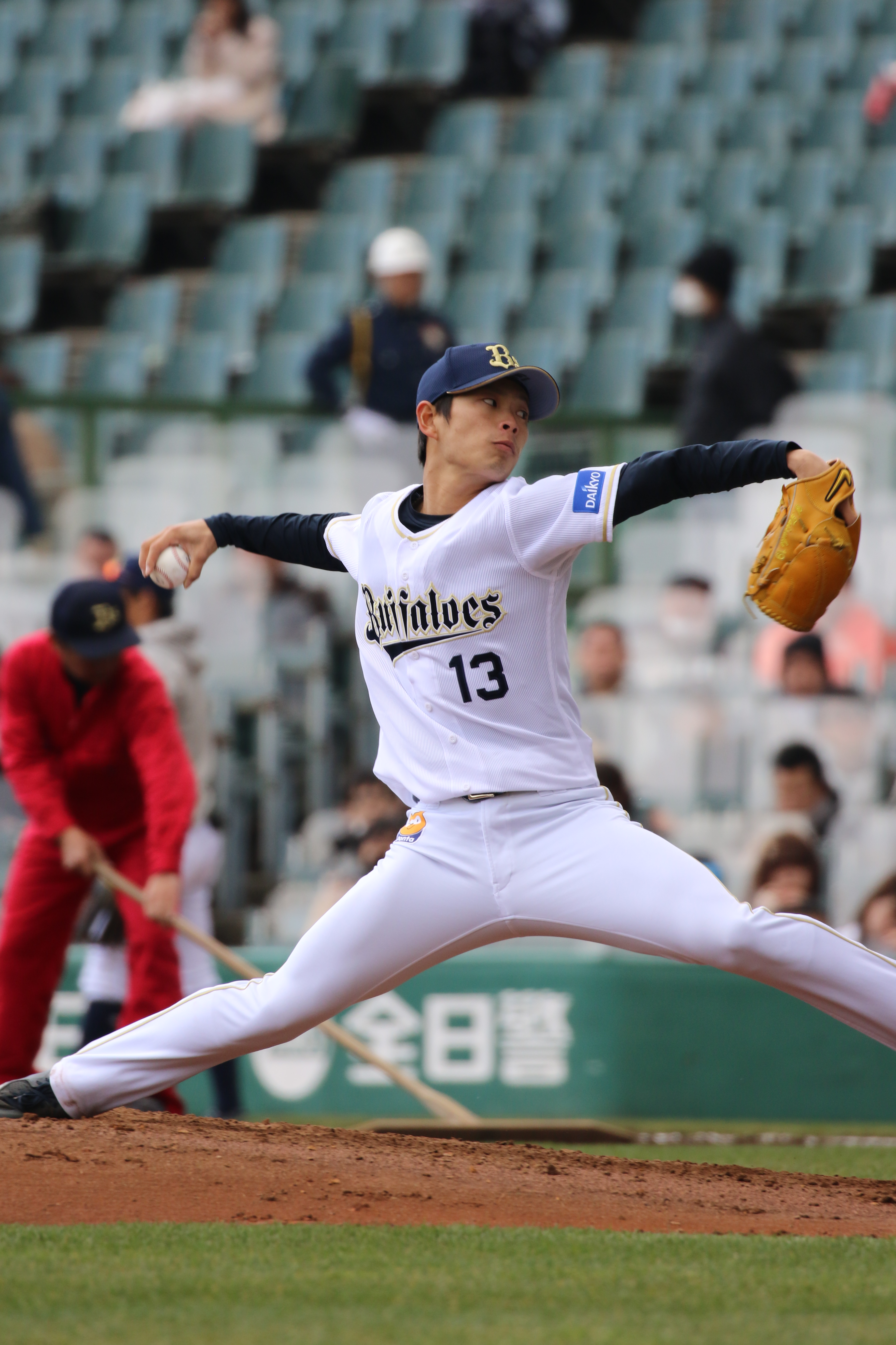 ｵﾘｯｸｽ山岡選手